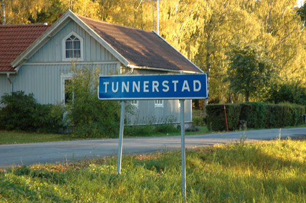 Skylt i Tunnerstad, Visingsö Foto: Marcus Bornestav, 2005-10-15